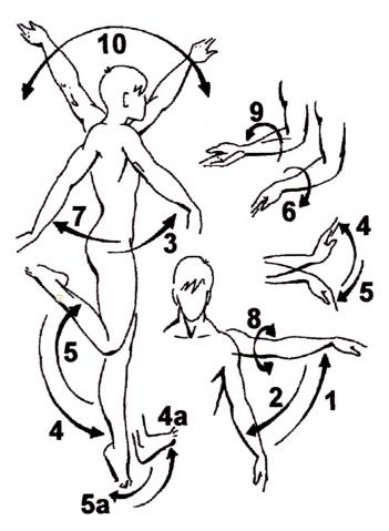 Anatomische Bewegungsrichtungen des Menschen